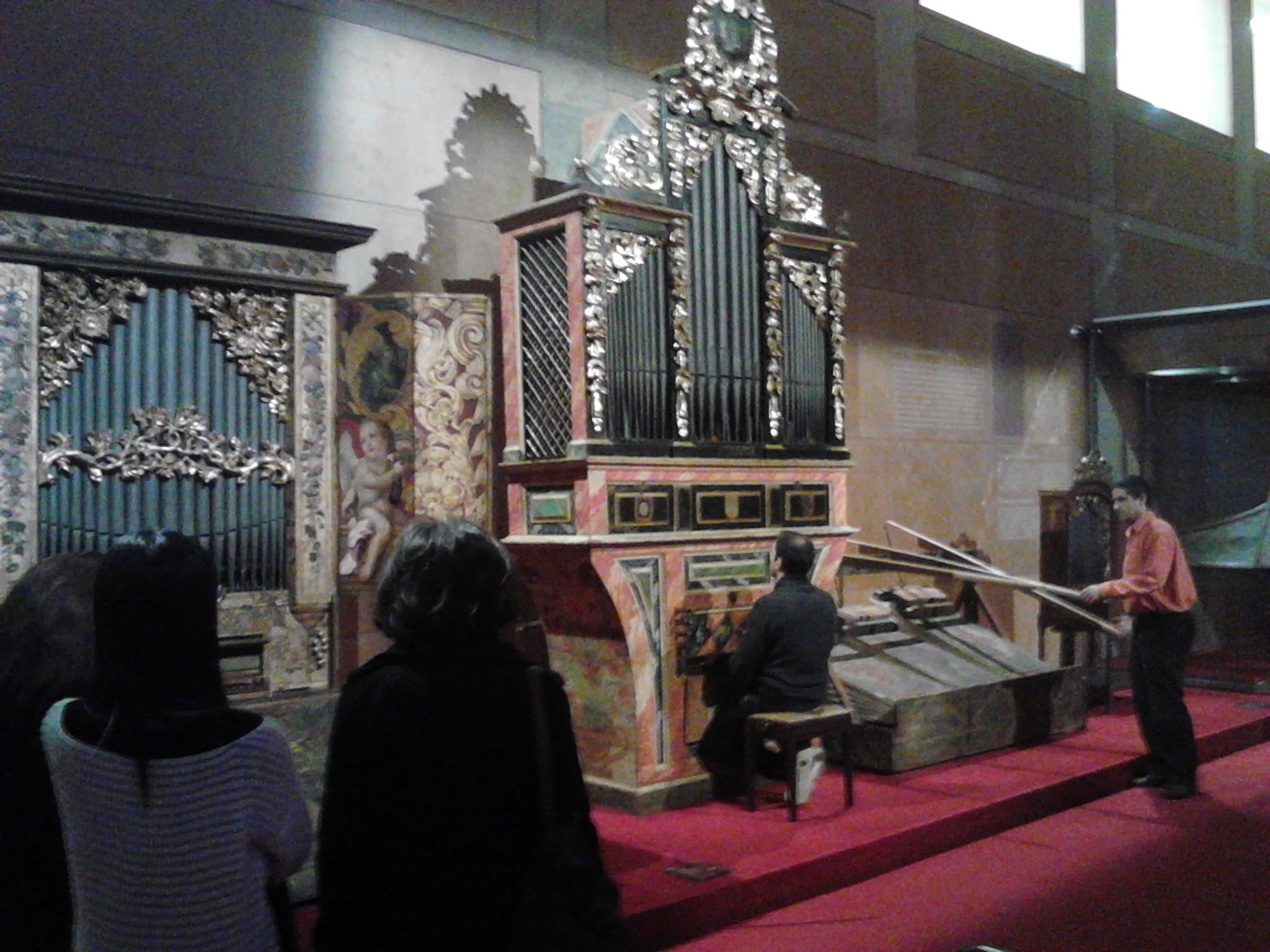 Órgano Pérez Molero siendo tocado (se necesitan dos personas, una que se encargue del teclado y otra que mueva los fuelles a mano para suministrar el aire) MDMB 55(?): Orgue, Josep Boscà, ?, ?-? MDMB 581: Orgue, D. Manuel Pérez Molero (Autor), 1719